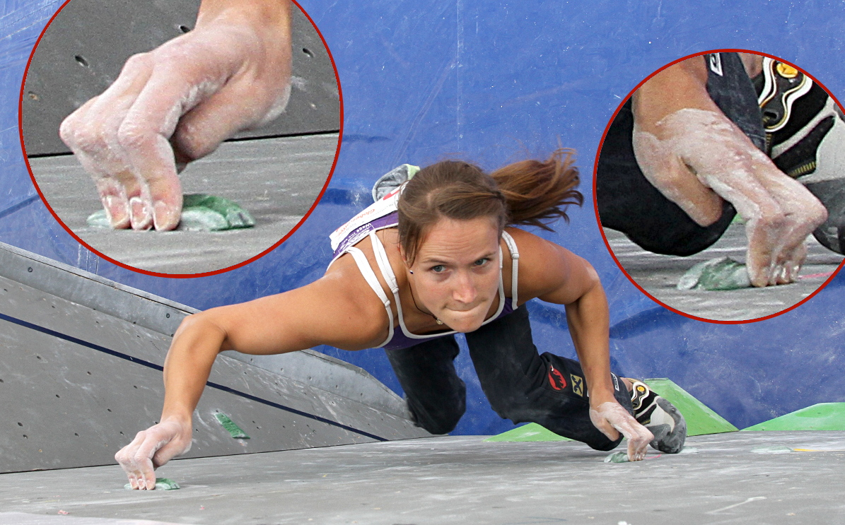 Anna Stoehr